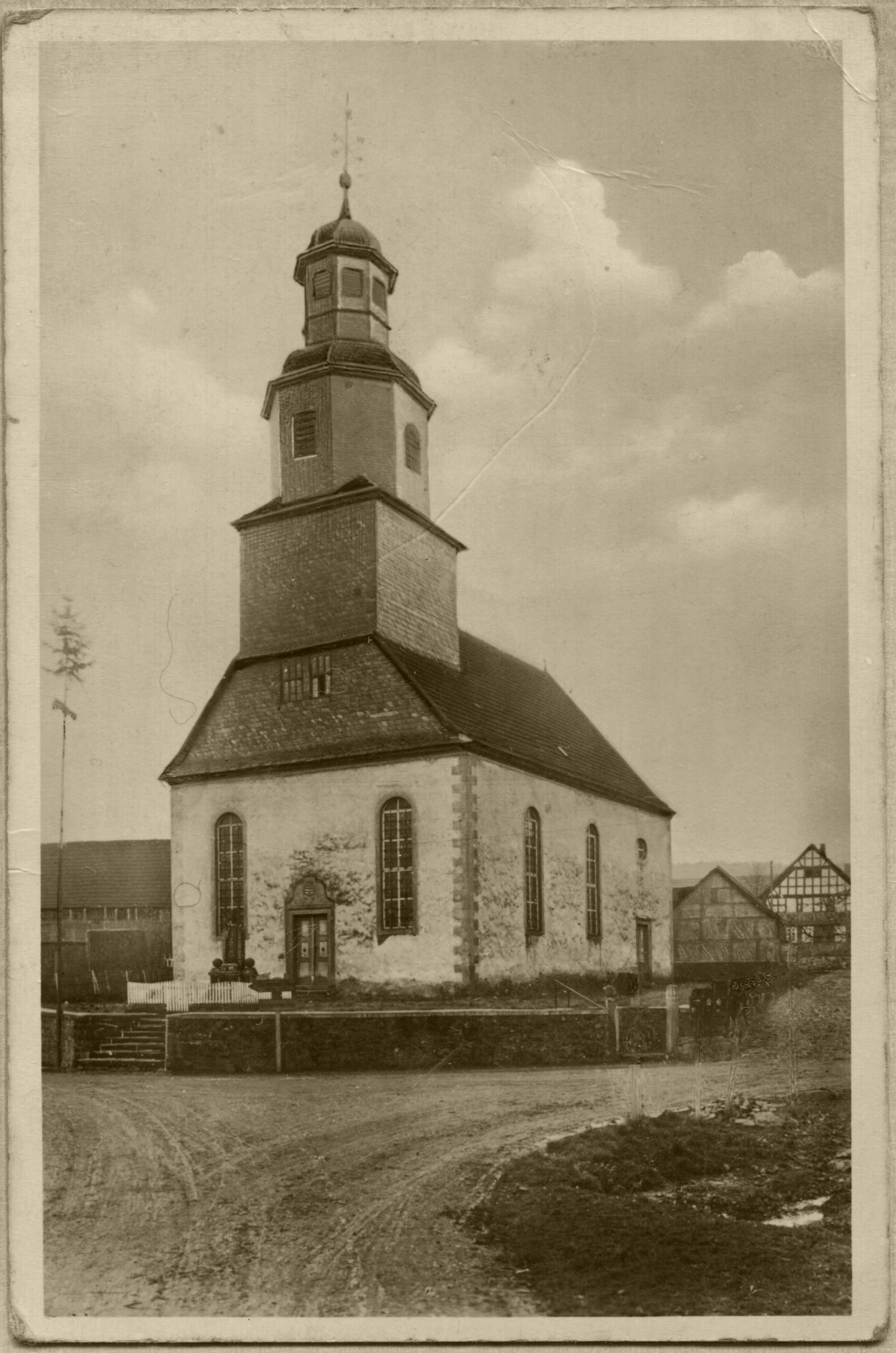 Ein altes Archivfoto der Kirche Lichenroth aus dem Jahr 1945